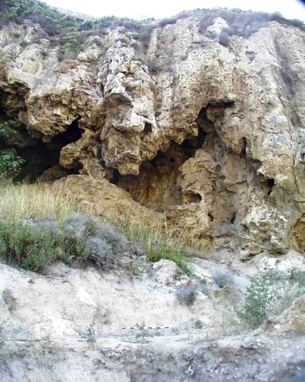 Fotogragia del jaciment de la Balma dels Pinyons